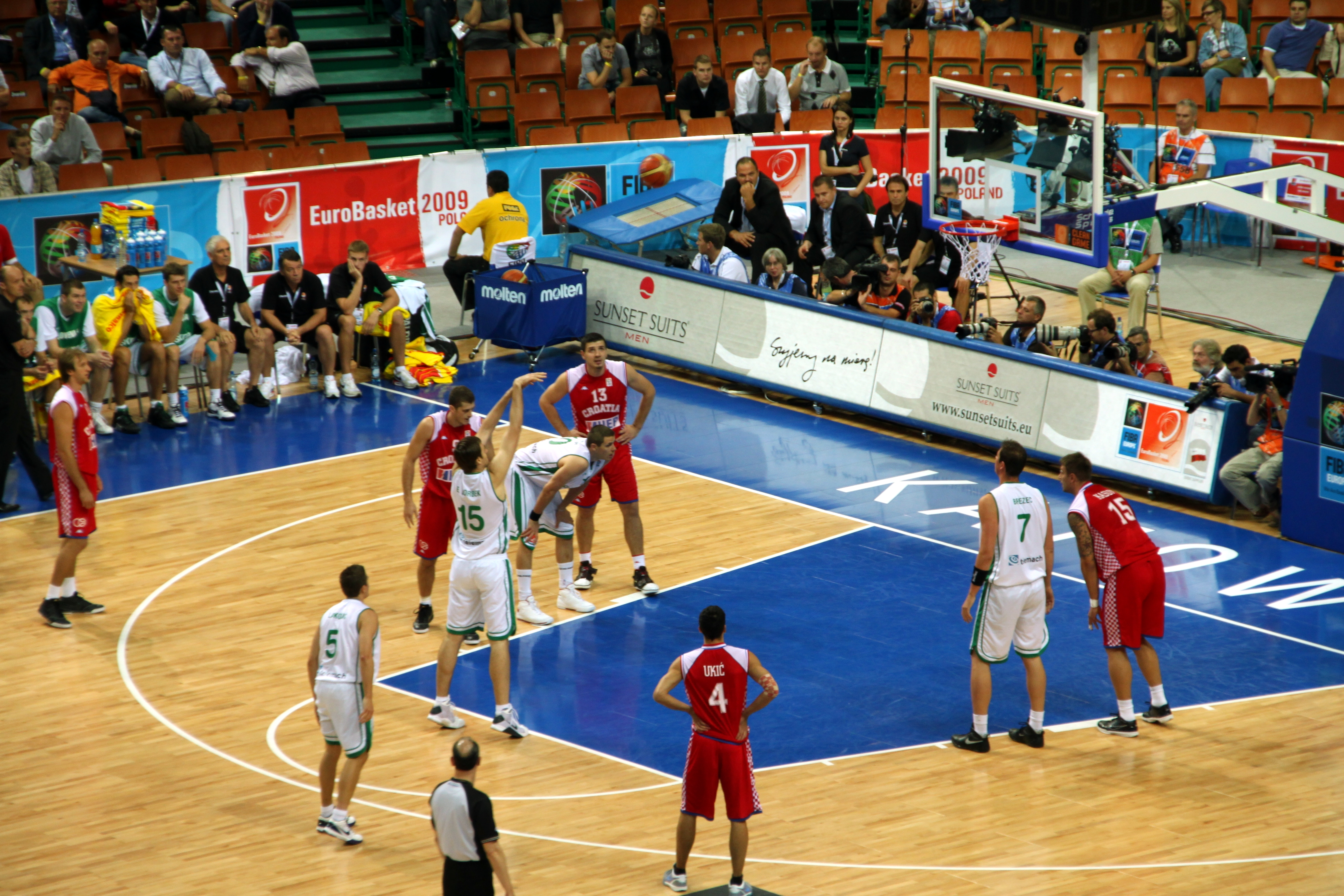 Slovenia - Croatia at Eurobasket 2009